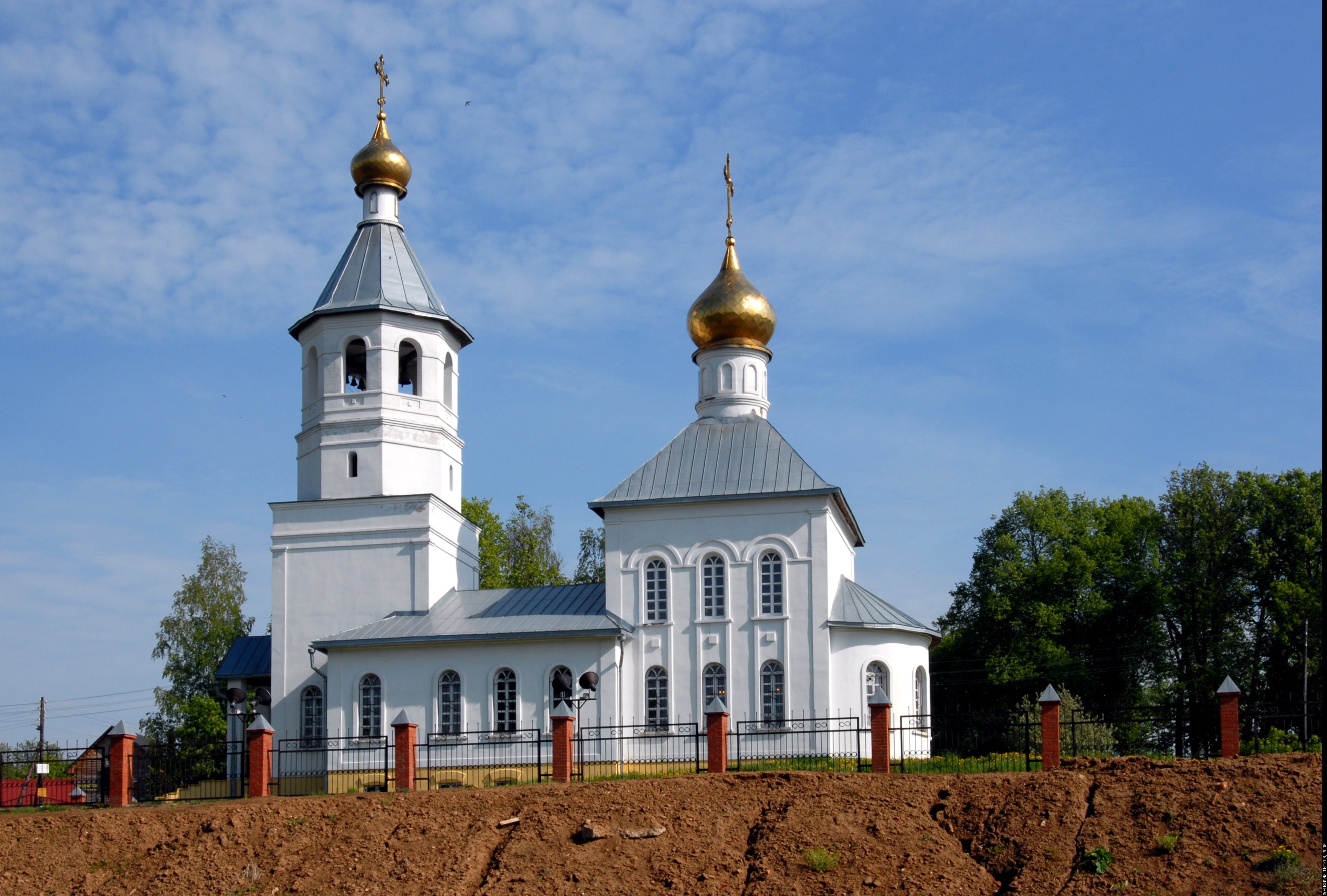 Храм Святителя Николая (Тишково)